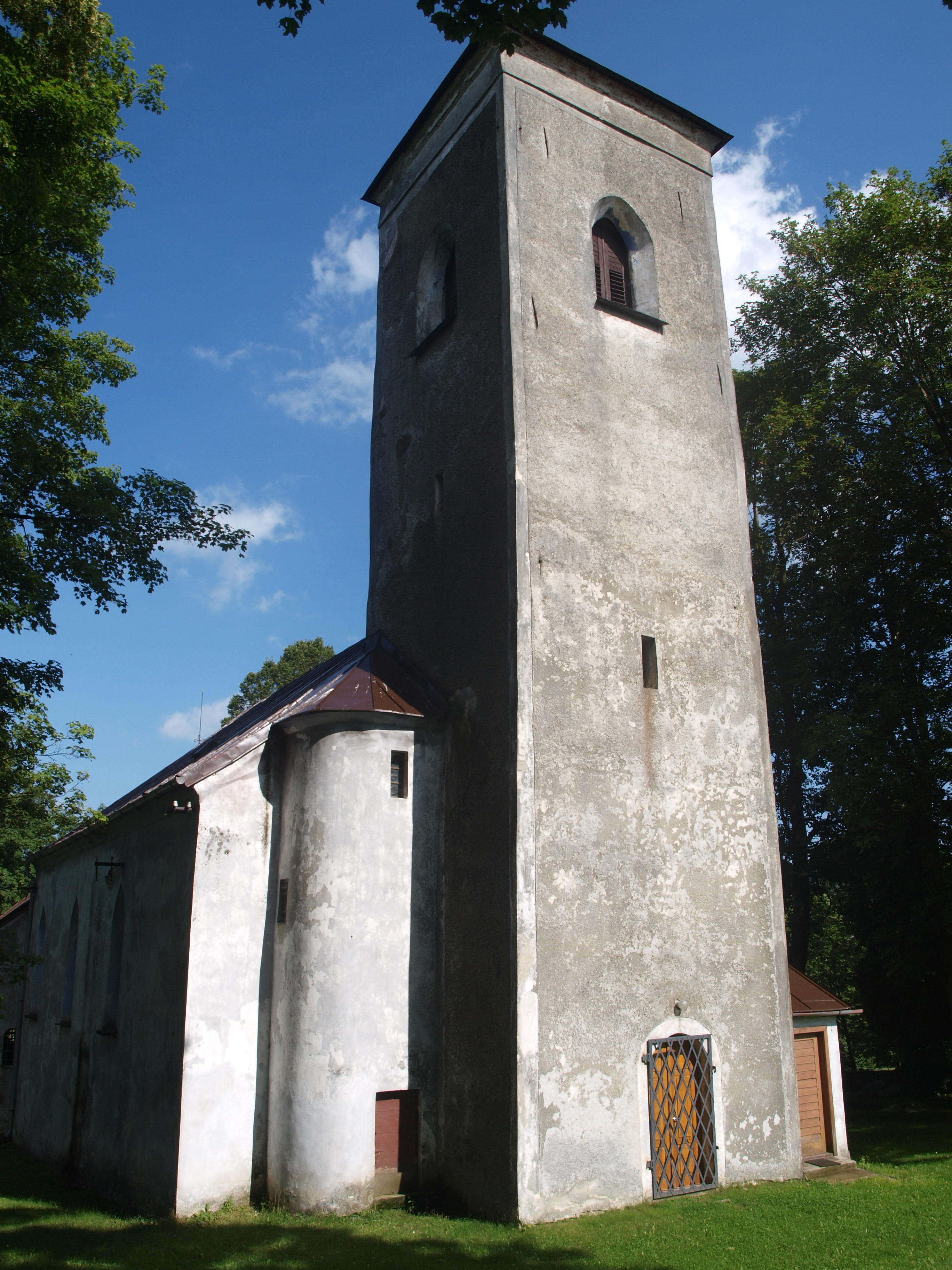 Kostel svatého Jiří v Lomnici (okr. Bruntál)